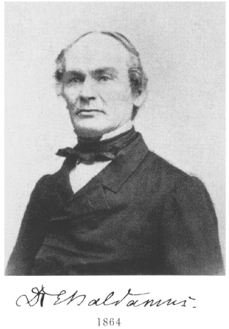 August Carl Eduard Baldamus (April 18, 1812 in Giersleben, Saxony-Anhalt – October 30, 1893 in Coburg)